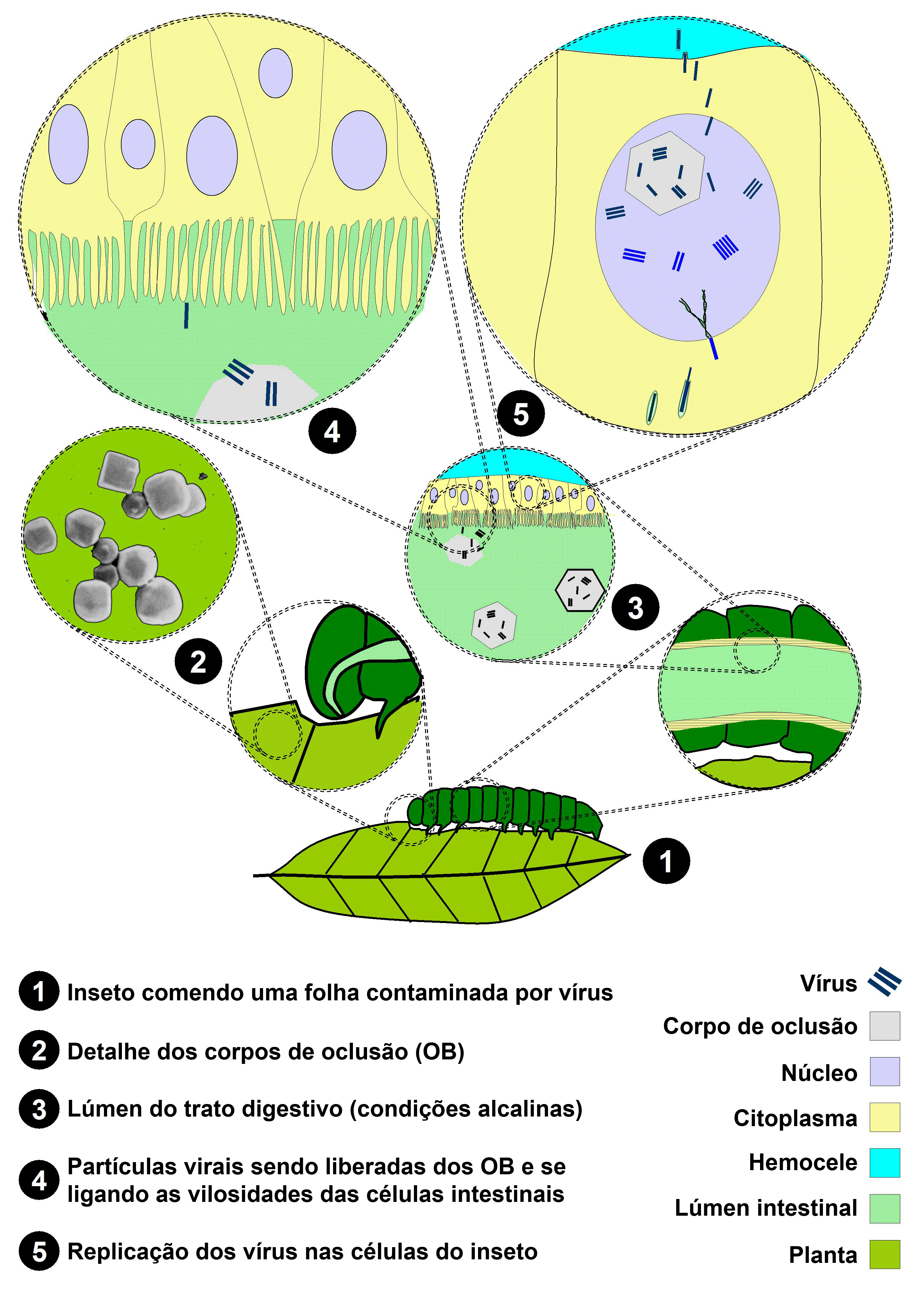 Ciclo de vida de um NPV